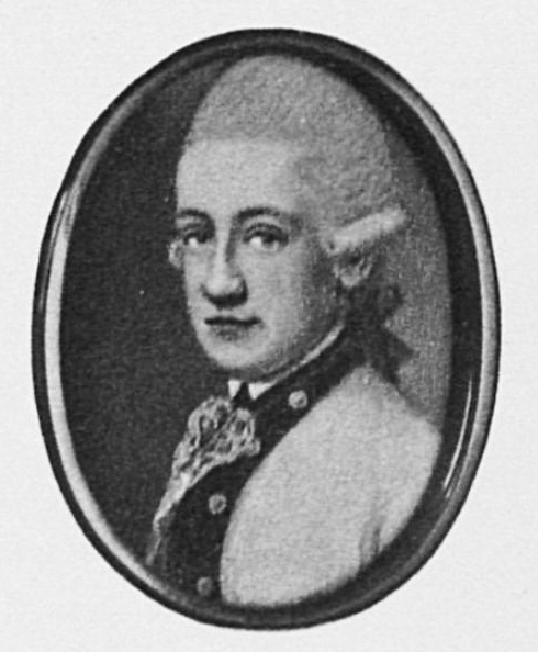 Демидов Александр Григорьевич (1737-1803)